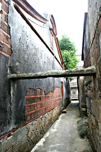 臺灣金門金城北門外明遺古跡隘門。